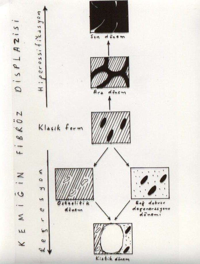 Kemiğin fibröz displazisinin evreleri